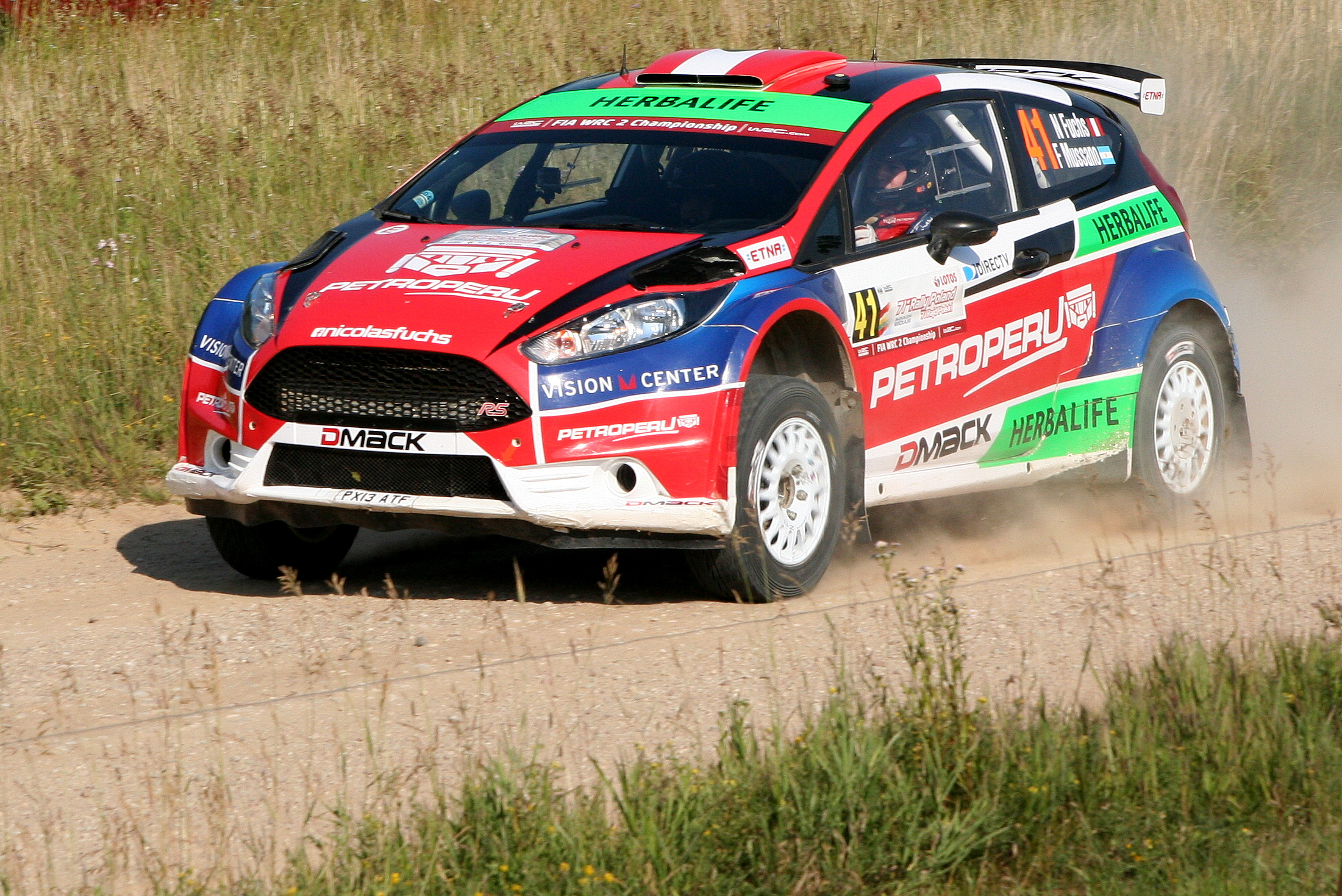 Nicolás Fuchs podczas Rajdu Polski 2014, 11 OS Chmielówka 1